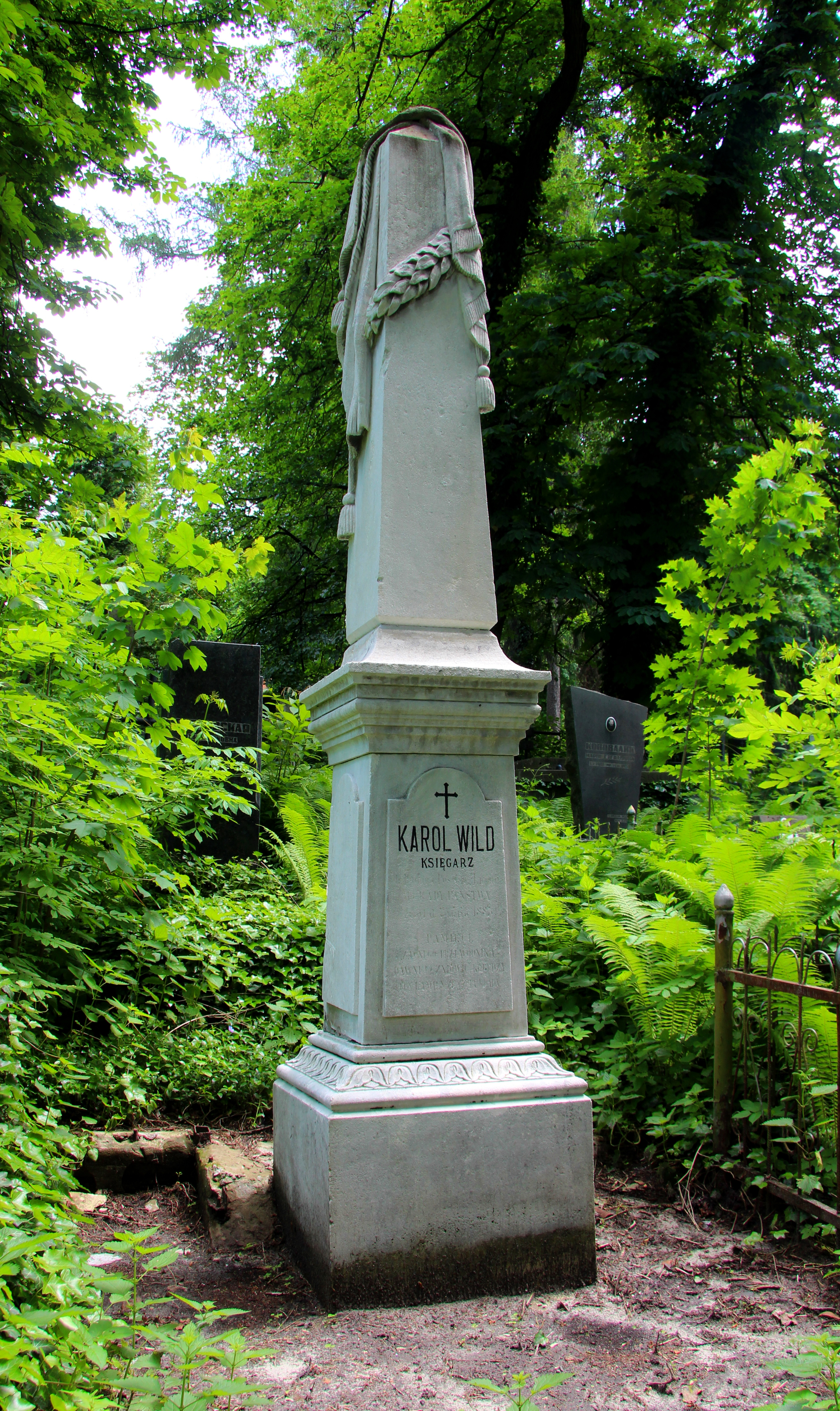 Надгробок на могилі К. Вільда.Личаківський цвинтар , поле № 9.